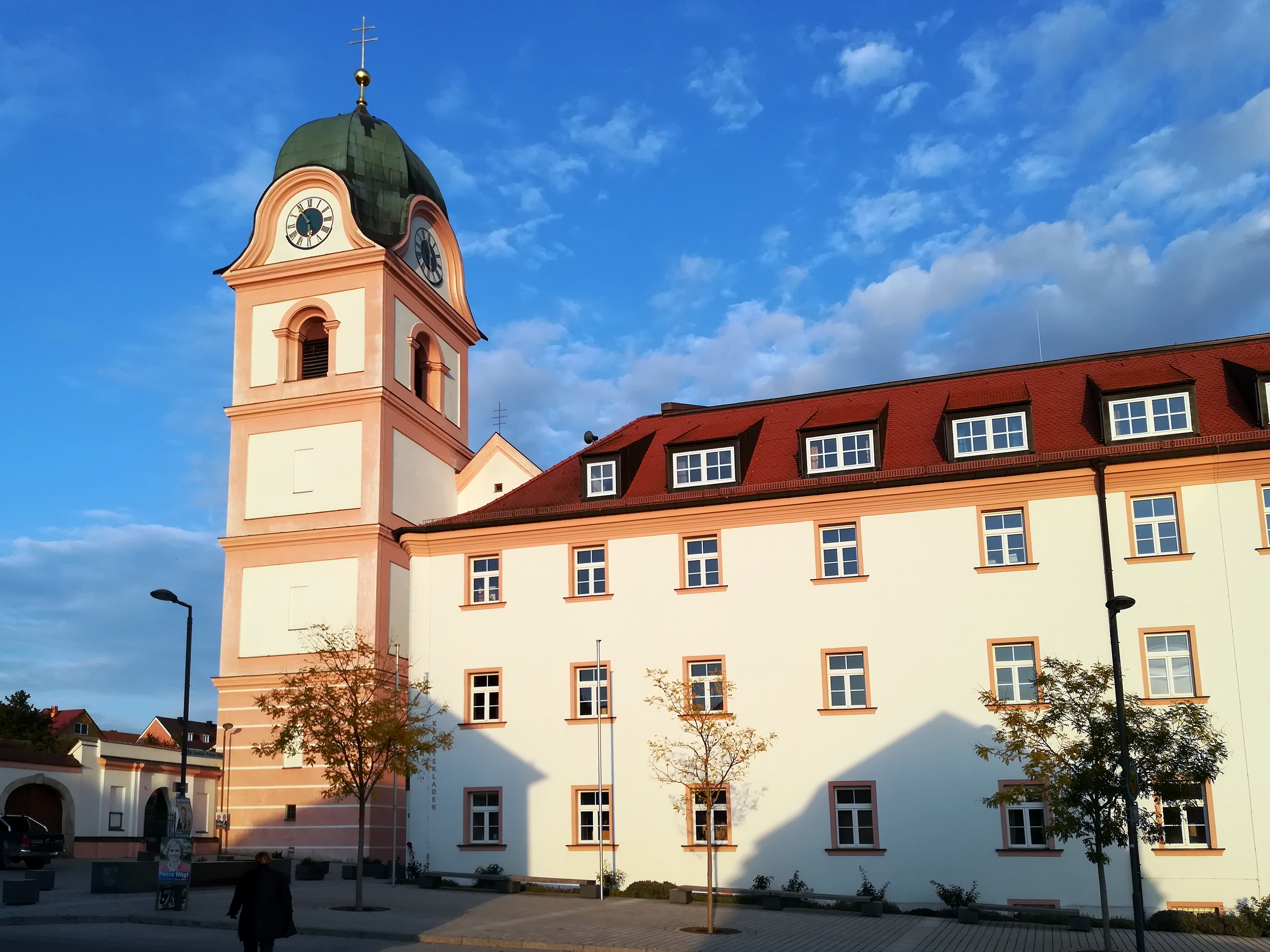 Das Kloster Rohr ist ein ehemaliges Kloster der Augustiner-Chorherren und heute eine Benediktinerabtei in Rohr in Niederbayern.